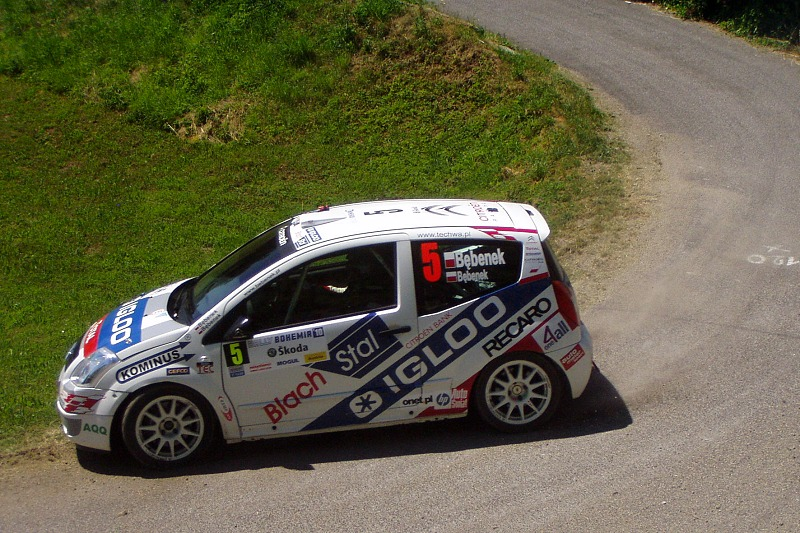 Rally Bohemia 2010 RZ Sychrov